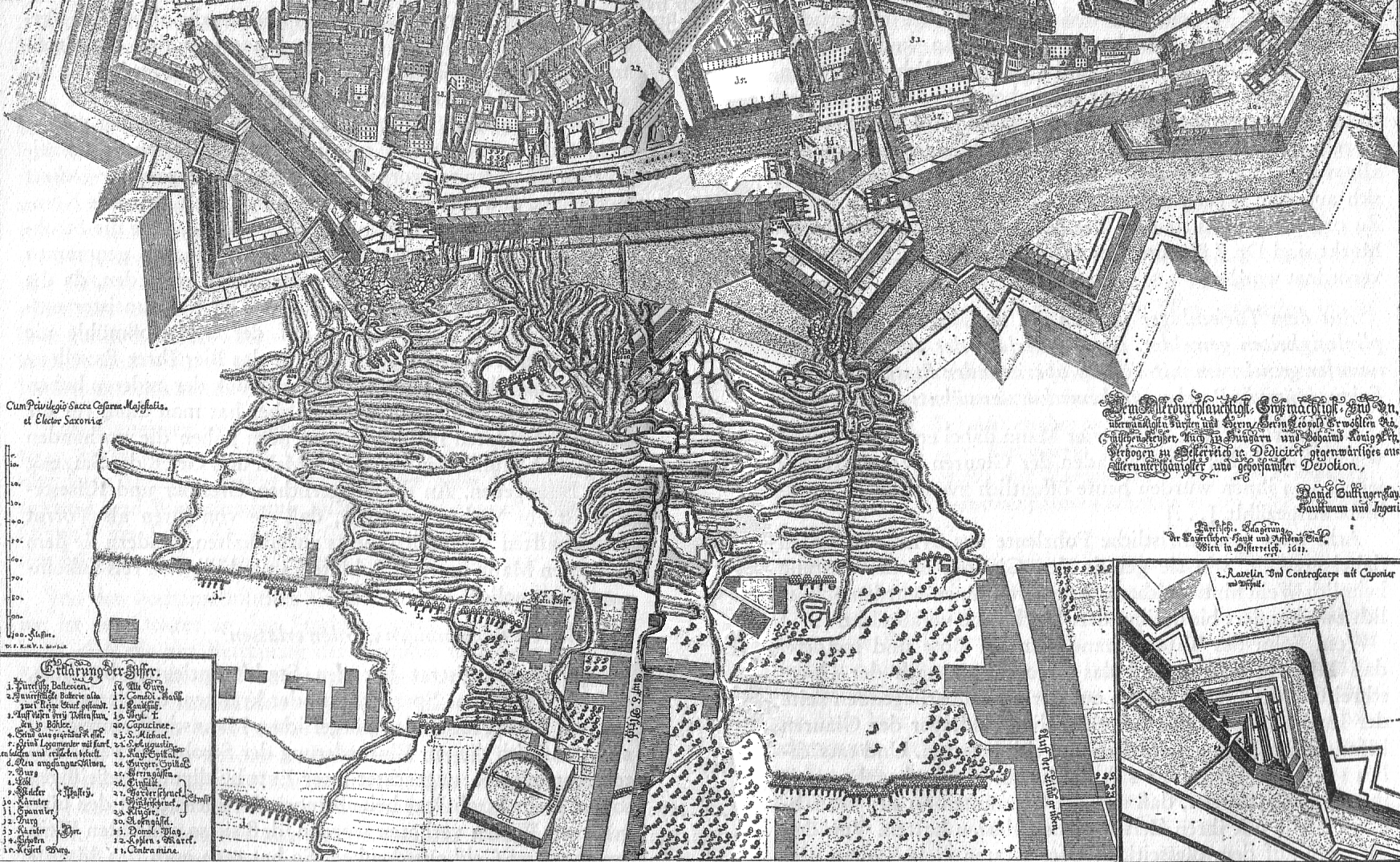 2. Türkenbelagerung; Laufgräben vor Wien gegen Ravelin, die Löbel- und Burgbastei